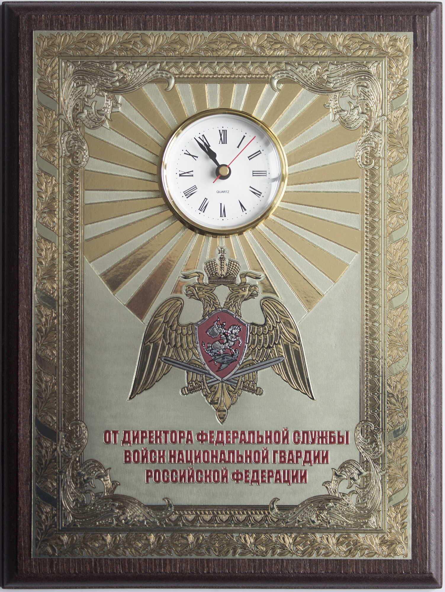 Рельефная плакетка с часами с символикой Росгвардии